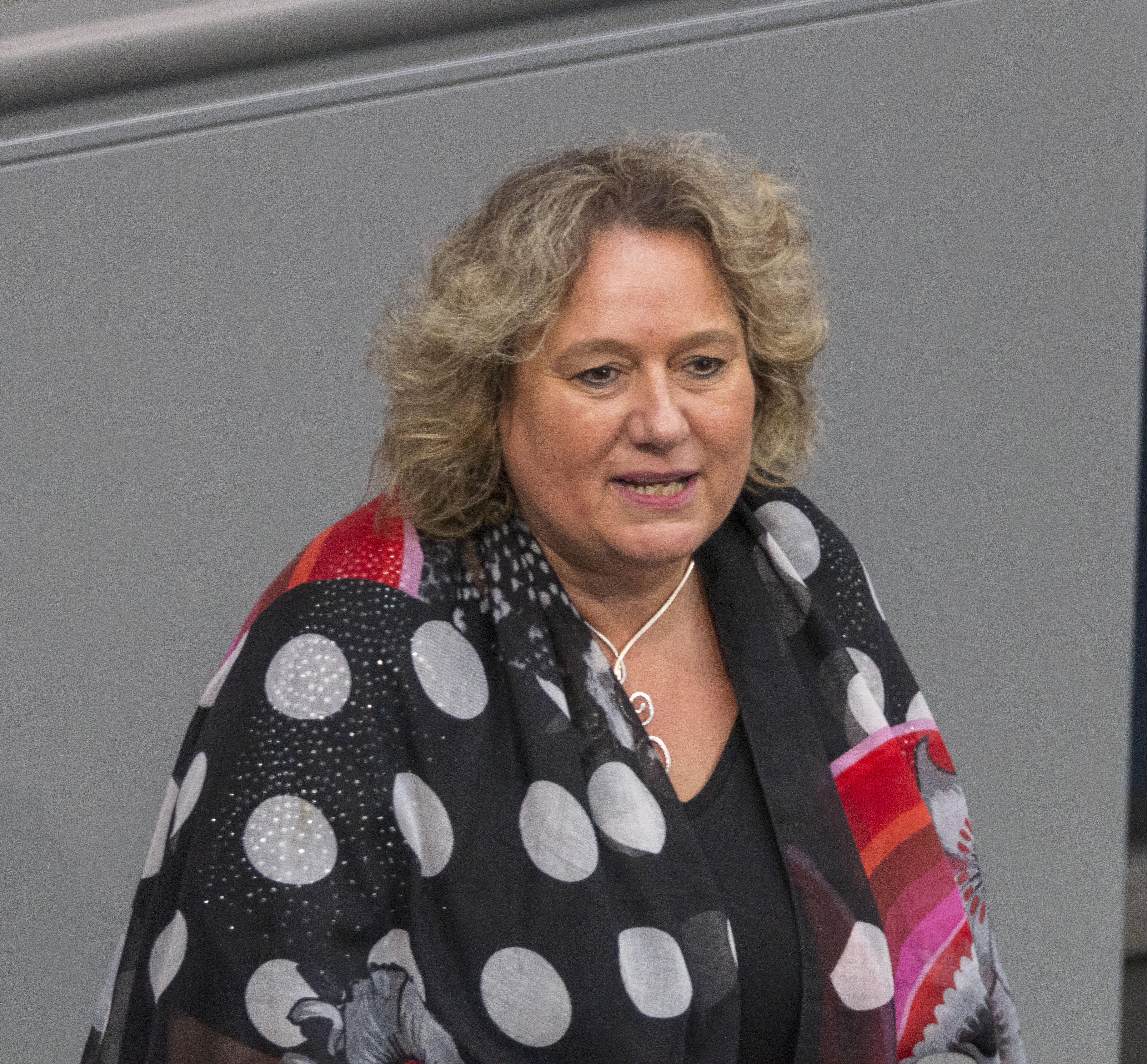 Kerstin Tack, Bundestagsabgeordnete der SPD während der Plenarsitzung des Deutschen Bundestages am 2. Juli 2020 in Berlin.